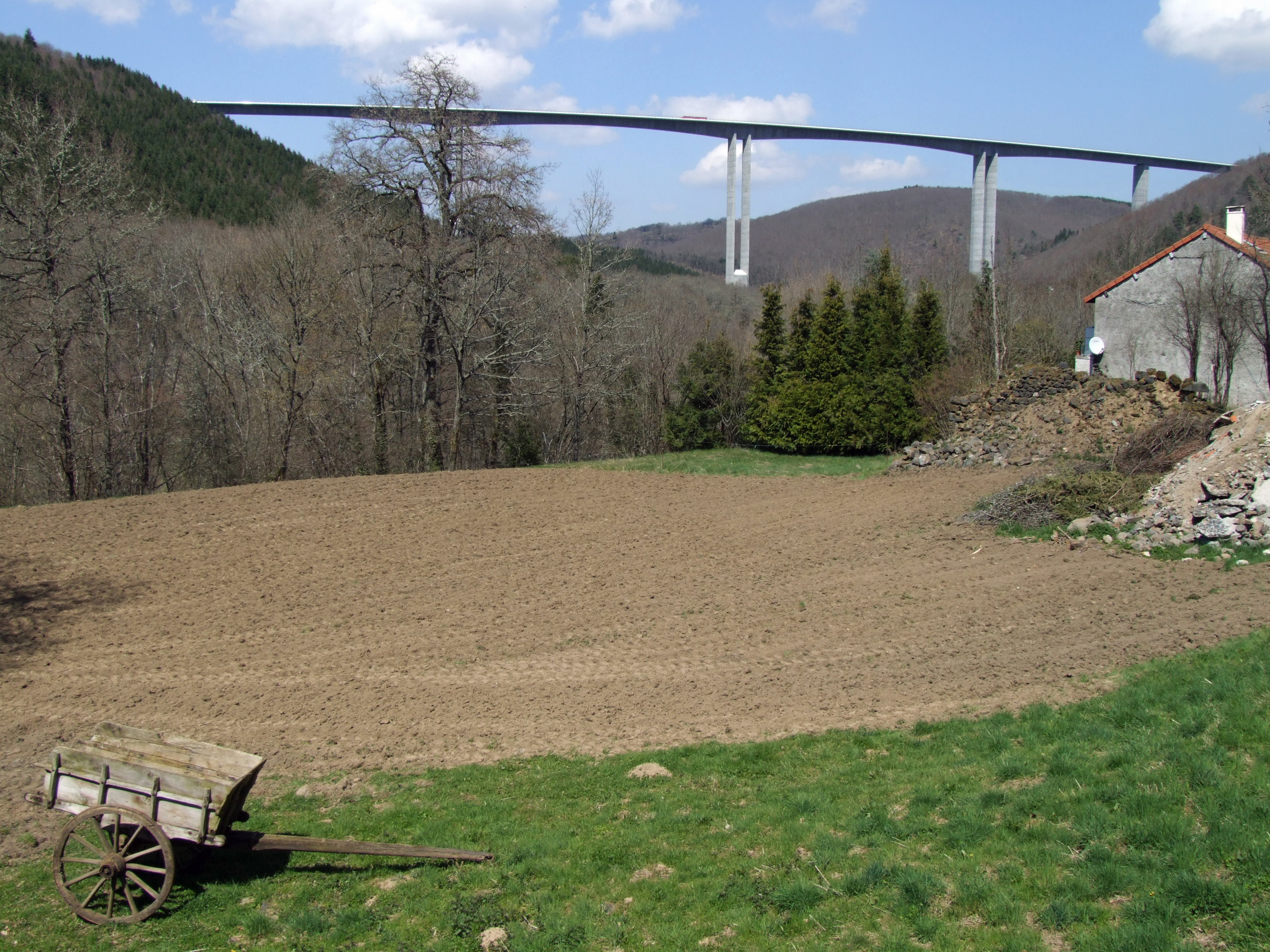 A89 - Viaduc de la Sioule - Ensemble